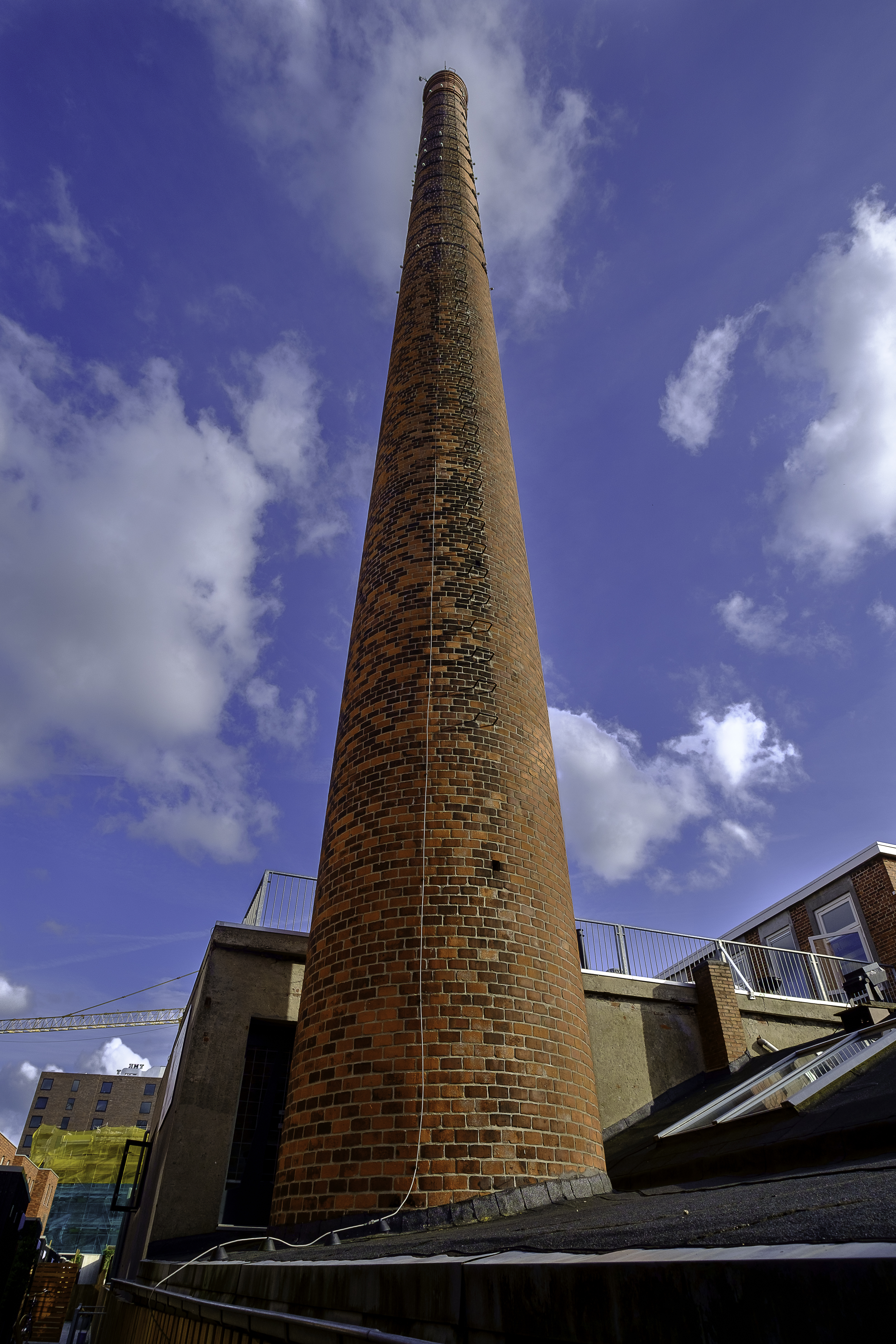 Schoorsteen van de voormalige Gerzon’s Vleeschconservenfabriek.